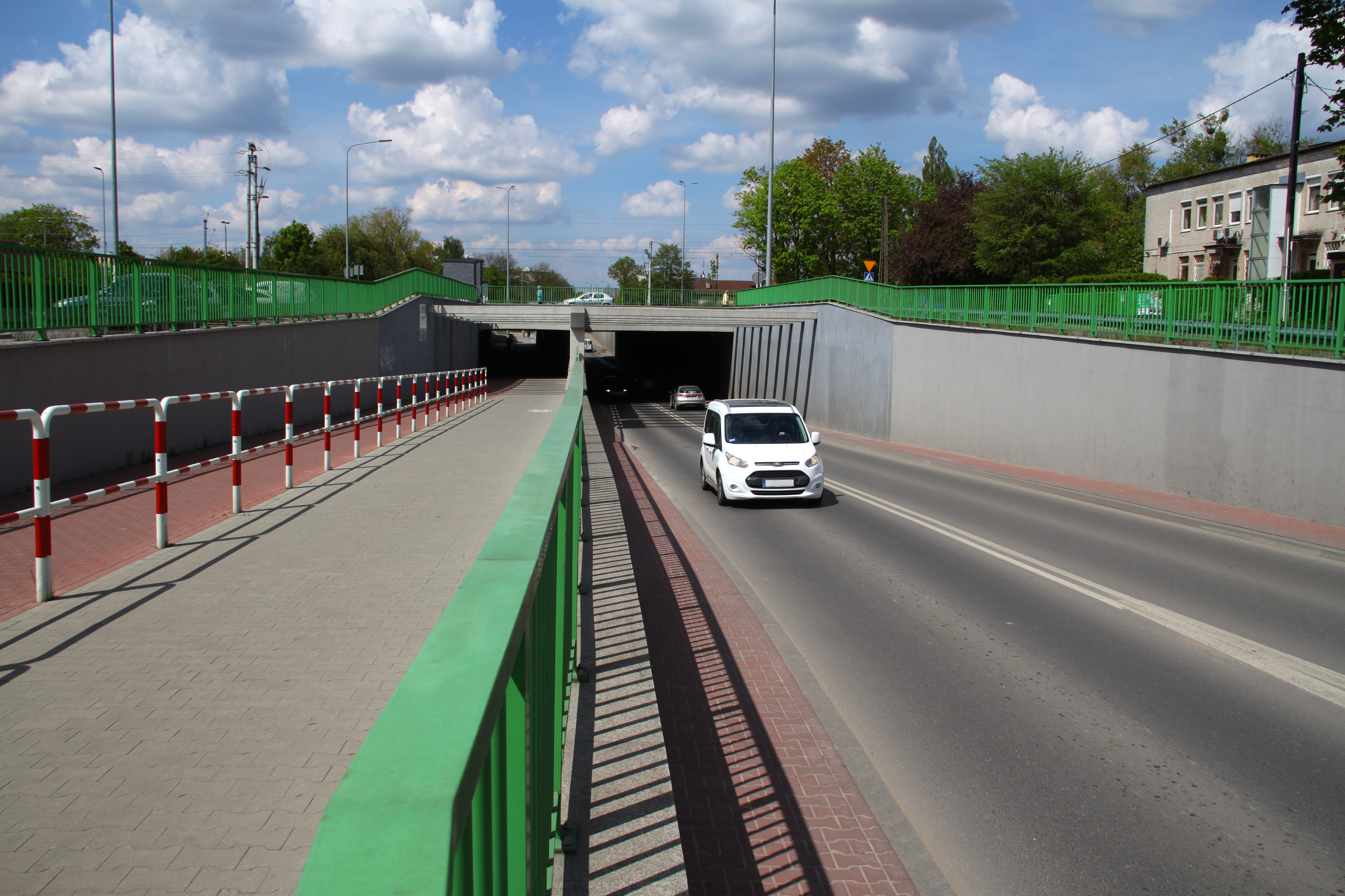 Tunel w Ząbkach od strony ul. Orlej (południa).